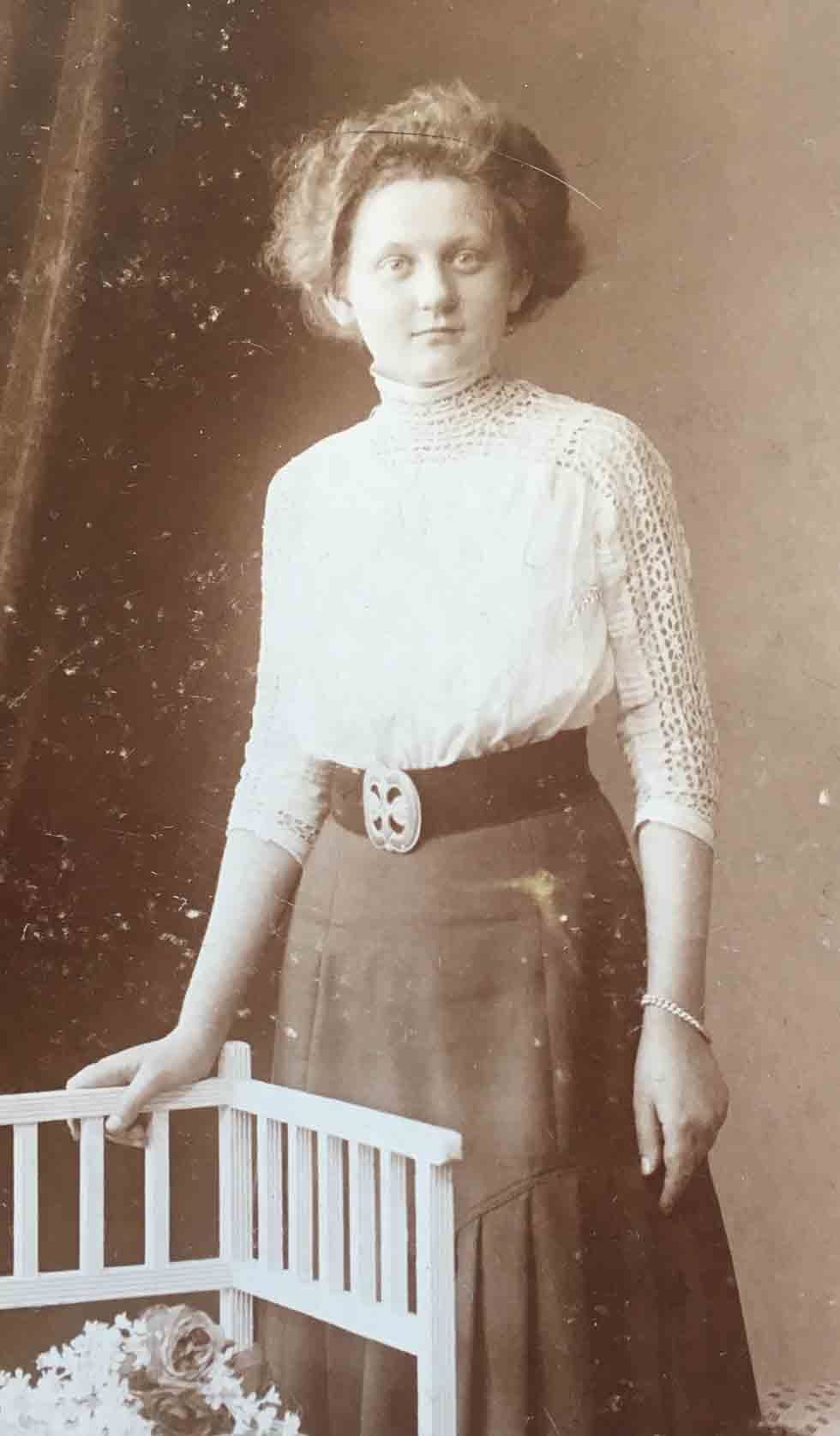 Else Bauer, Stadtverordnete und Vizepräsidentin des Brandenburger Landtages (undatiert)